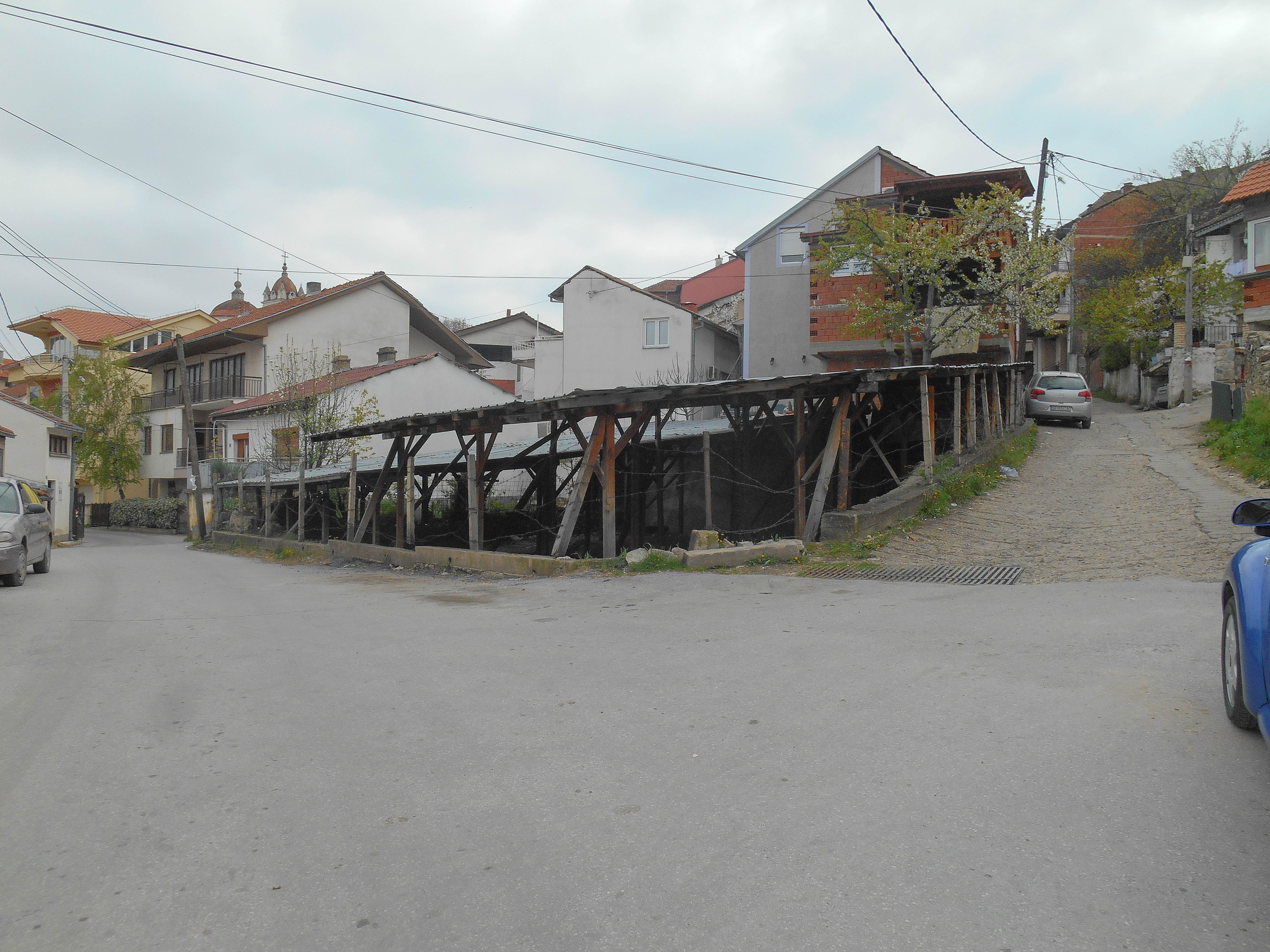 Археолошки локалитет Мачук